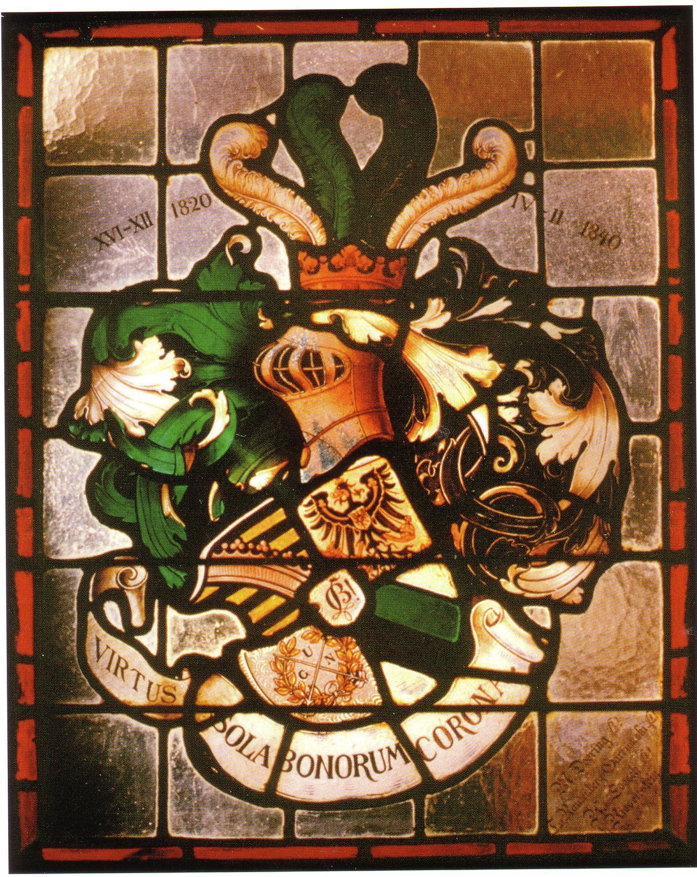 Das Wappen in einem Fenster des Corpshauses von Saxo-Borussia : Virtus sola bonorum corona!